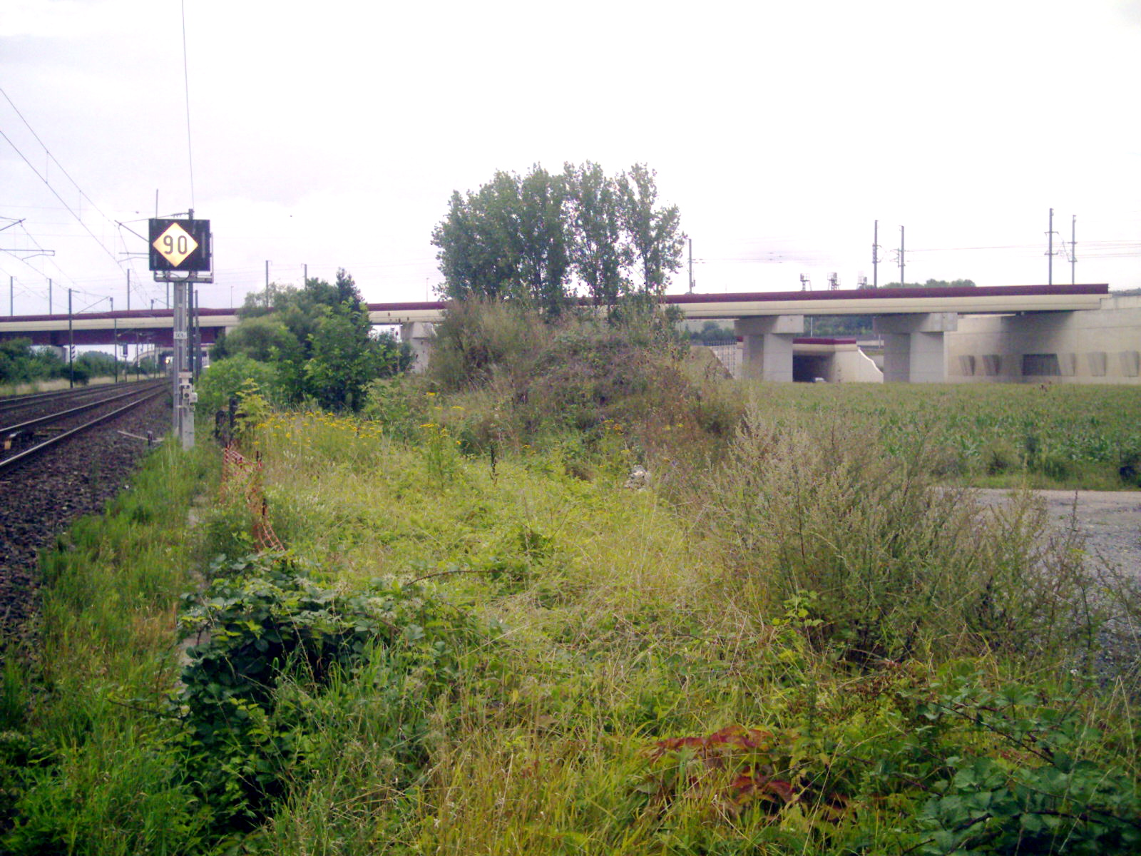 Viaduc de Vandières à l'emplacement de la future gare d'interconnexion entre la LGV est et la ligne Nancy-Metz. Photographie depuis la ligne Nancy-Metz.